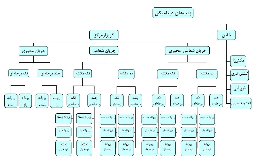 تقسيم بندی پمپ های ديناميكی